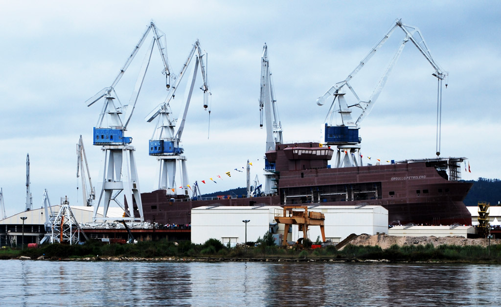 Día da botadura de Orgullo Petrolero en Navantia Ferrol, A Coruña